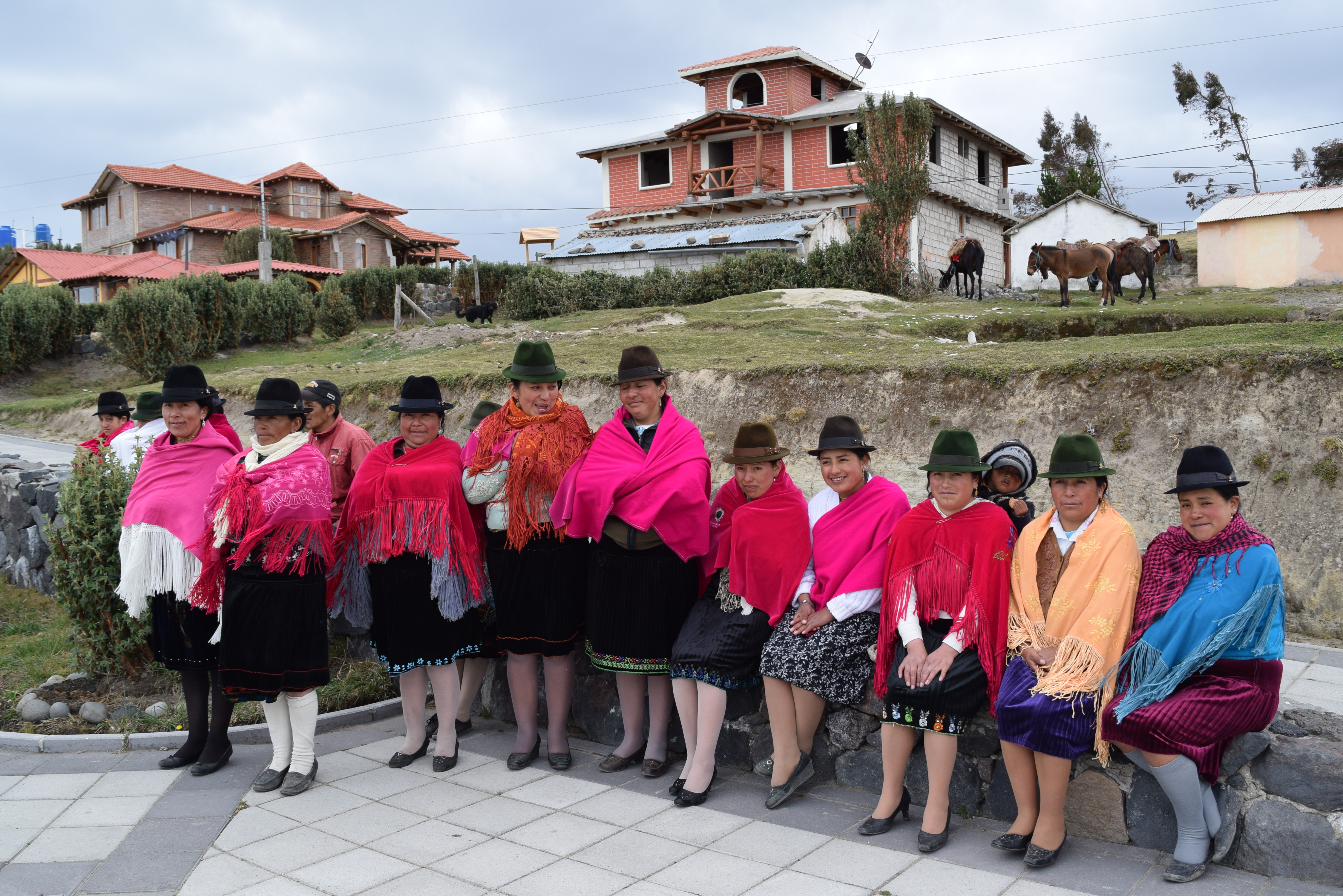 Laguna del Quilotoa (9)